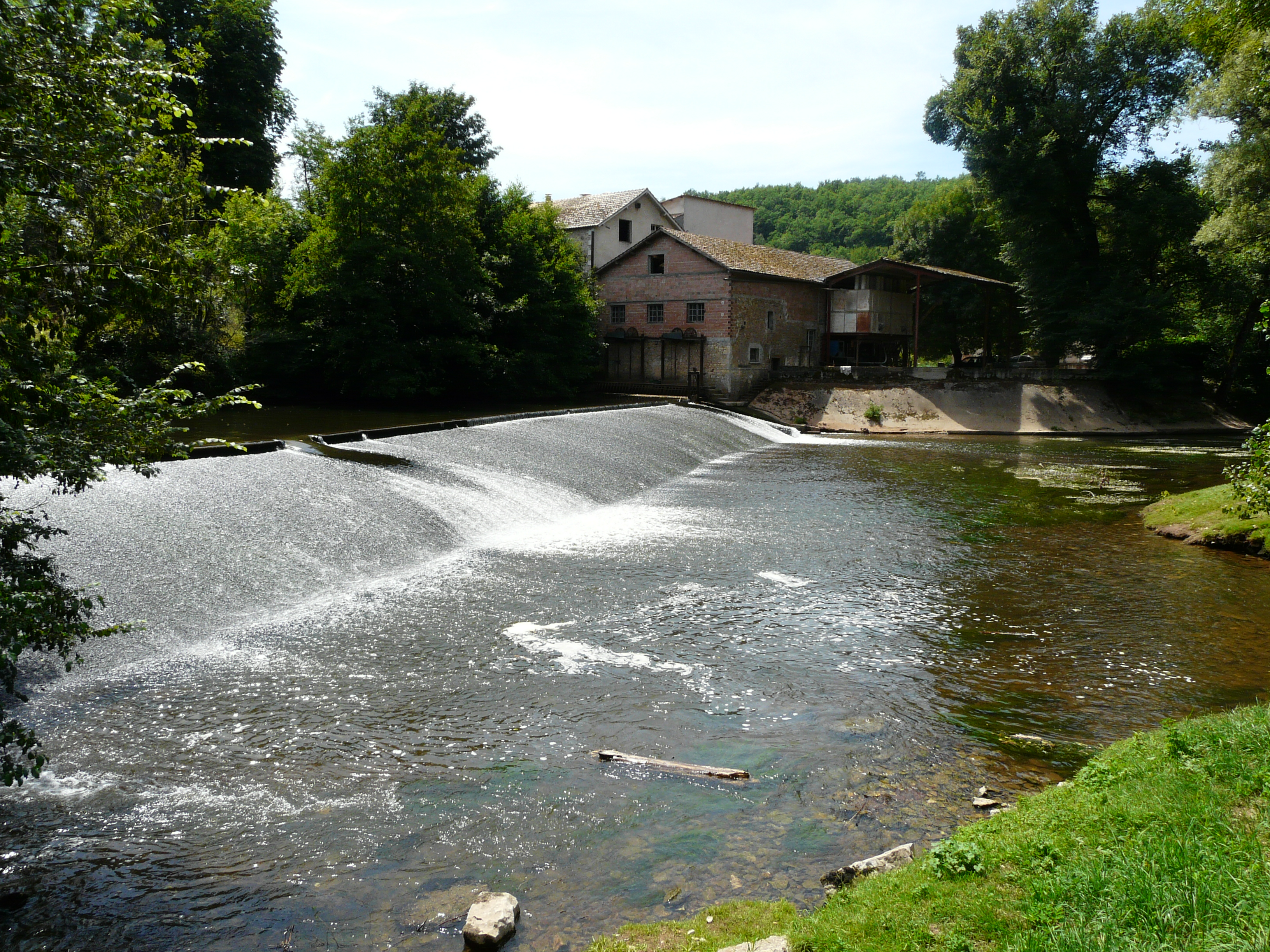 L'Auvézère au barrage de Marqueyssac, Saint-Pantaly-d'Ans, Dordogne, France.